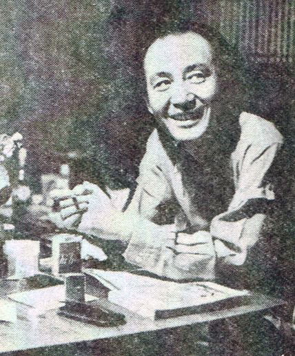 婦人生活社『婦人生活』第17巻第11号（1963）より後藤紀一